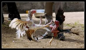 Gà chọi